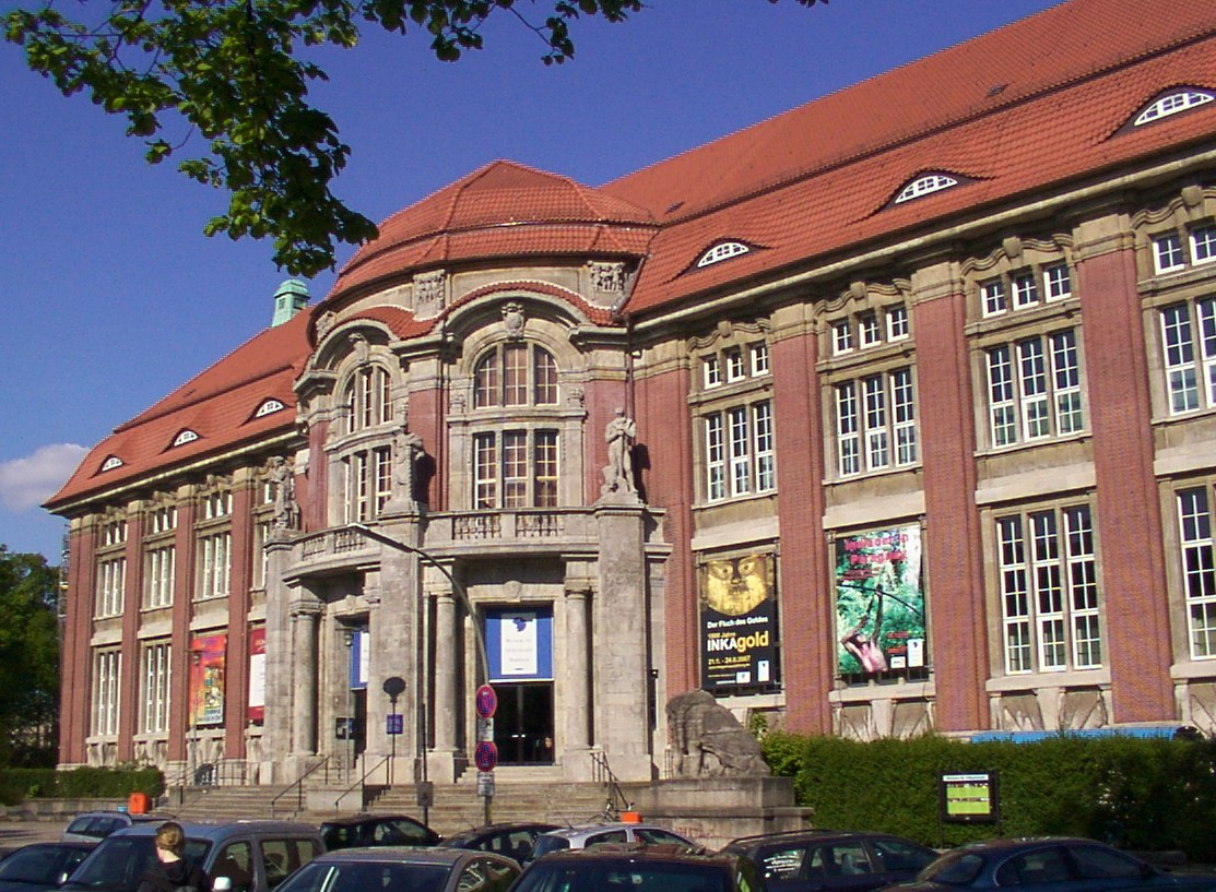 Museum fuer Voelkerkunde (= Museum für Ethnologies), Hamburg, Germany. View from Rothenbaumchaussee.